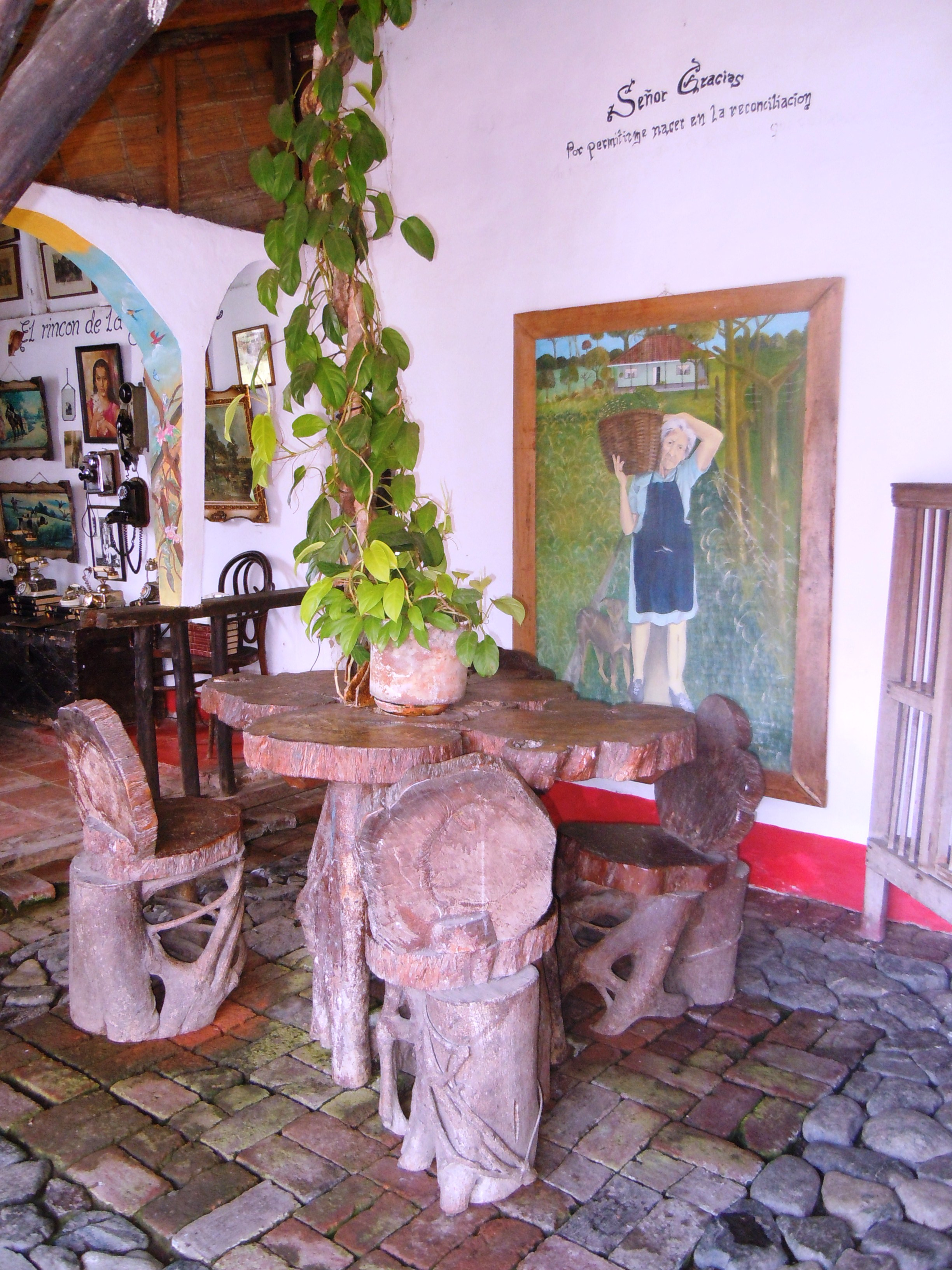 Casa Museo La Choza de Chuchu Santa Elena (El Cerrito)